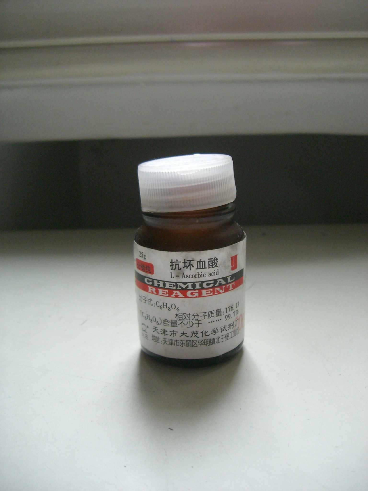 L-Ascorbic acid